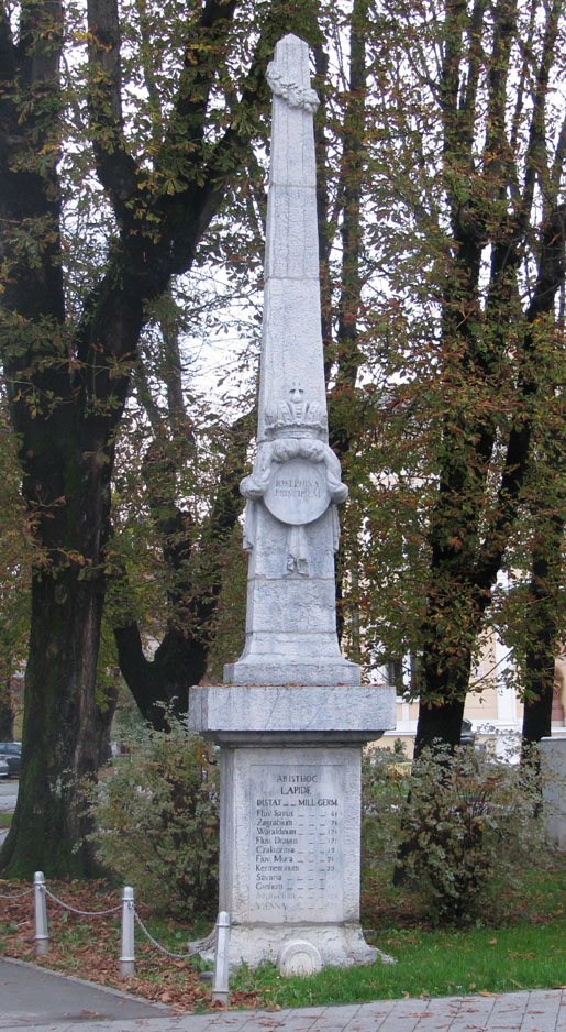 Karlovački miljokaz na Korzu - početak Jozefinske ceste